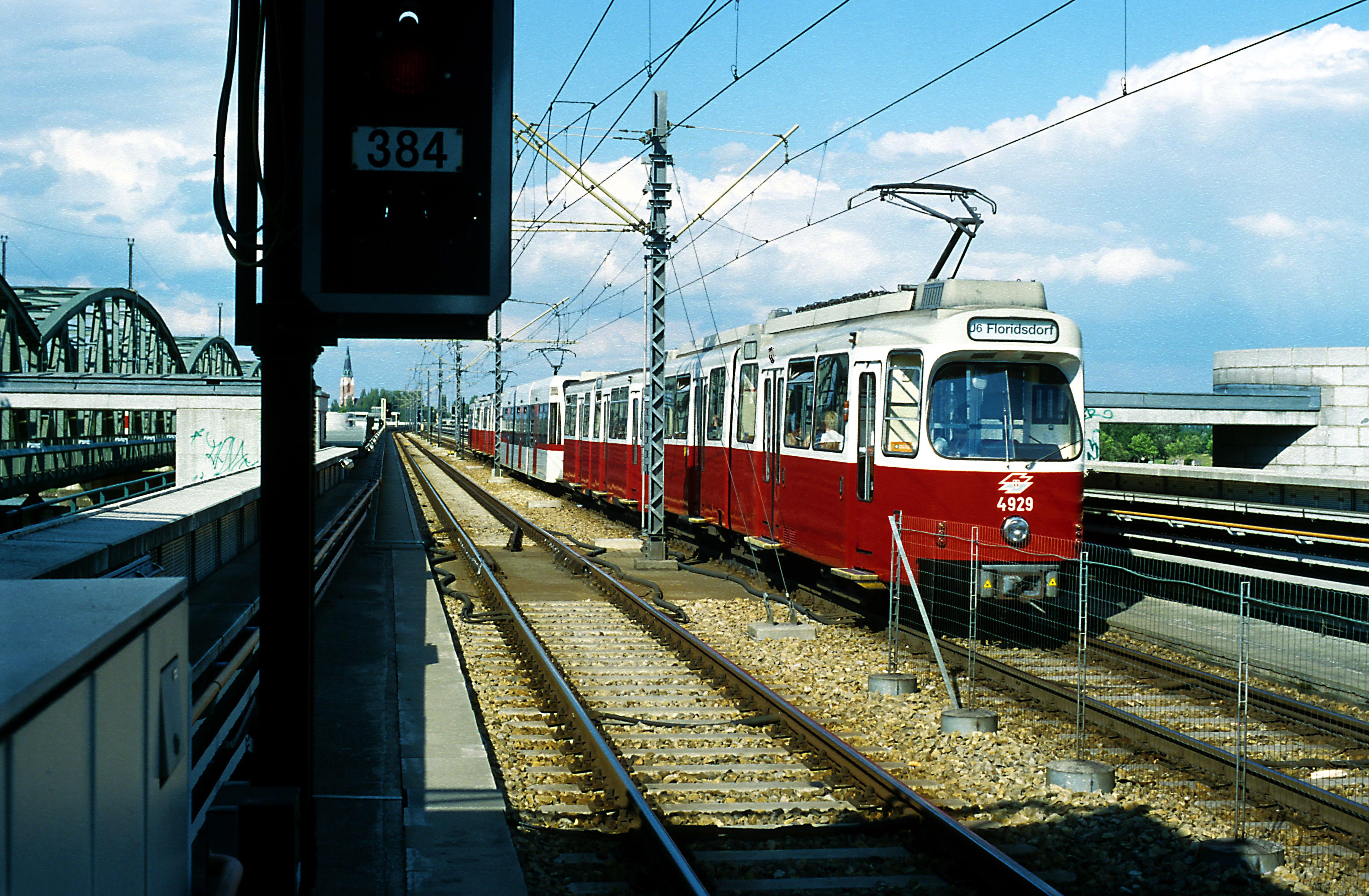 E6/c6-Zug nach Floridsdorf (Nachschuss), in Zugmitte läuft ein Niederflurwagen des Typs T. Links auf gleicher Höhe liegt die Nordbahnbrücke.